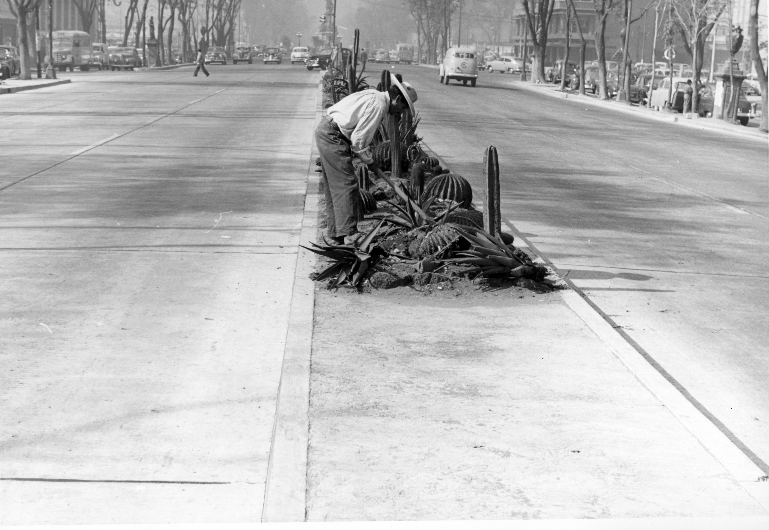 Fotografía antigua de la Ciudad de México resguardadas por el Museo Archivo de la Fotografía (MAF) de la Ciudad de México.